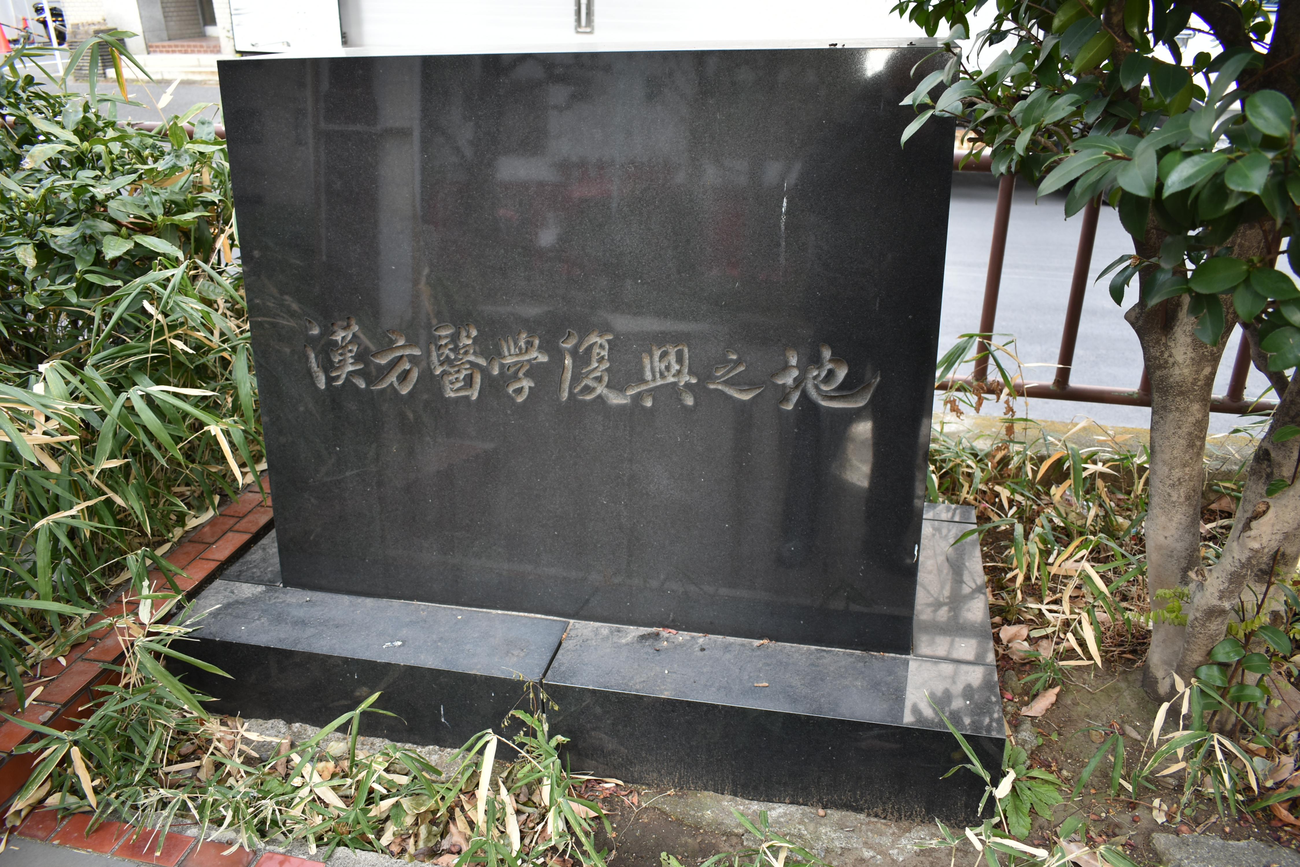 浜町 日本漢方医学復興之碑 Nikon D3400